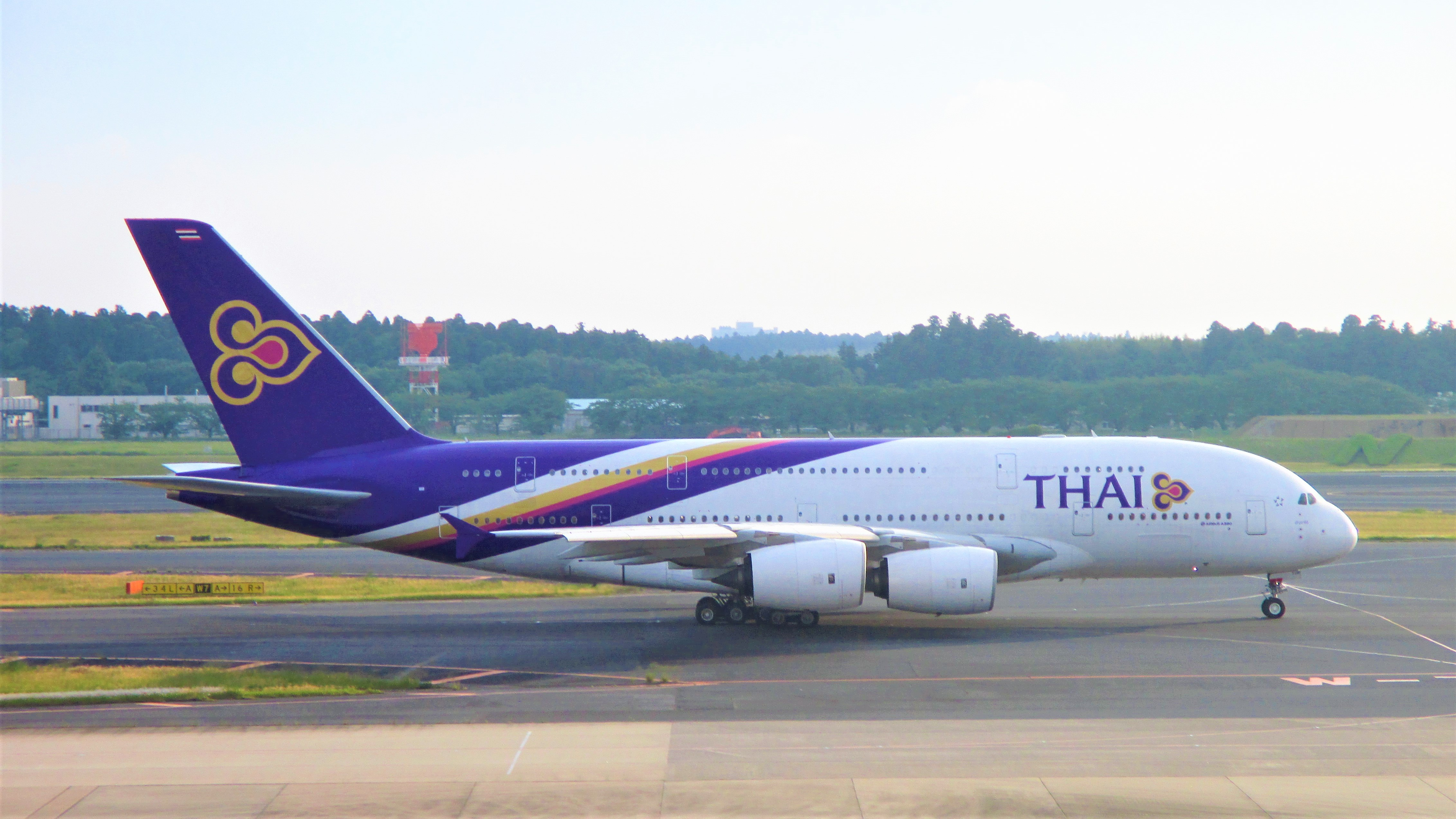 成田国際空港で撮影